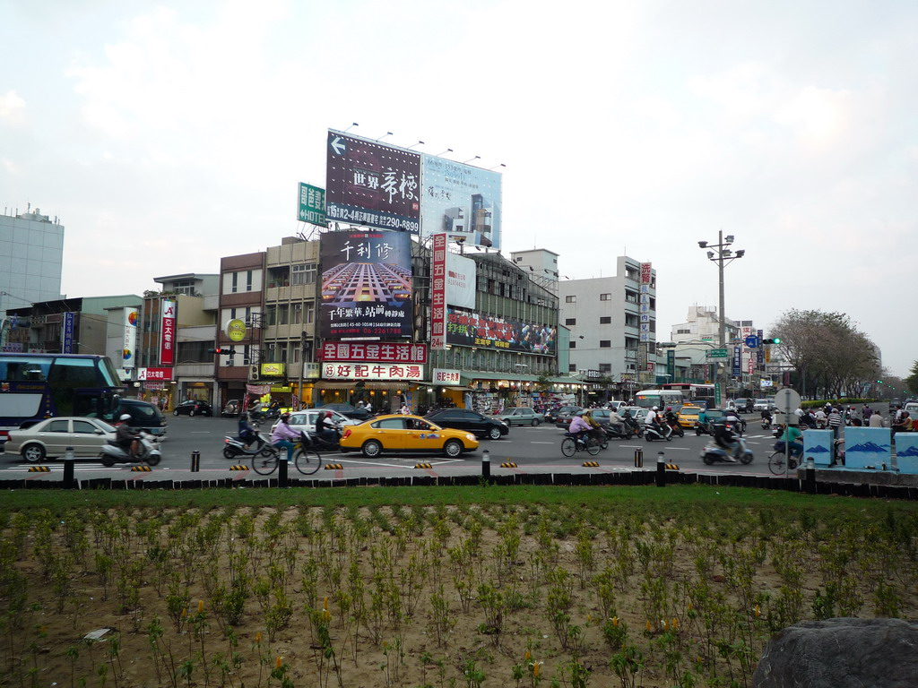 中文（台灣）: 臺南市東區東門路二段與林森路二段路口。